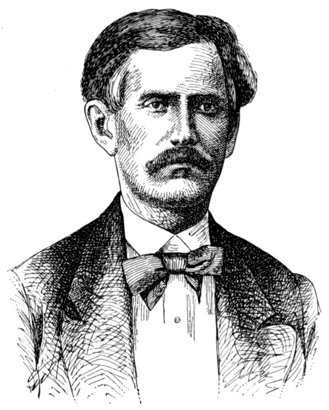 Puerto Rican politician Román Baldorioty de Castro